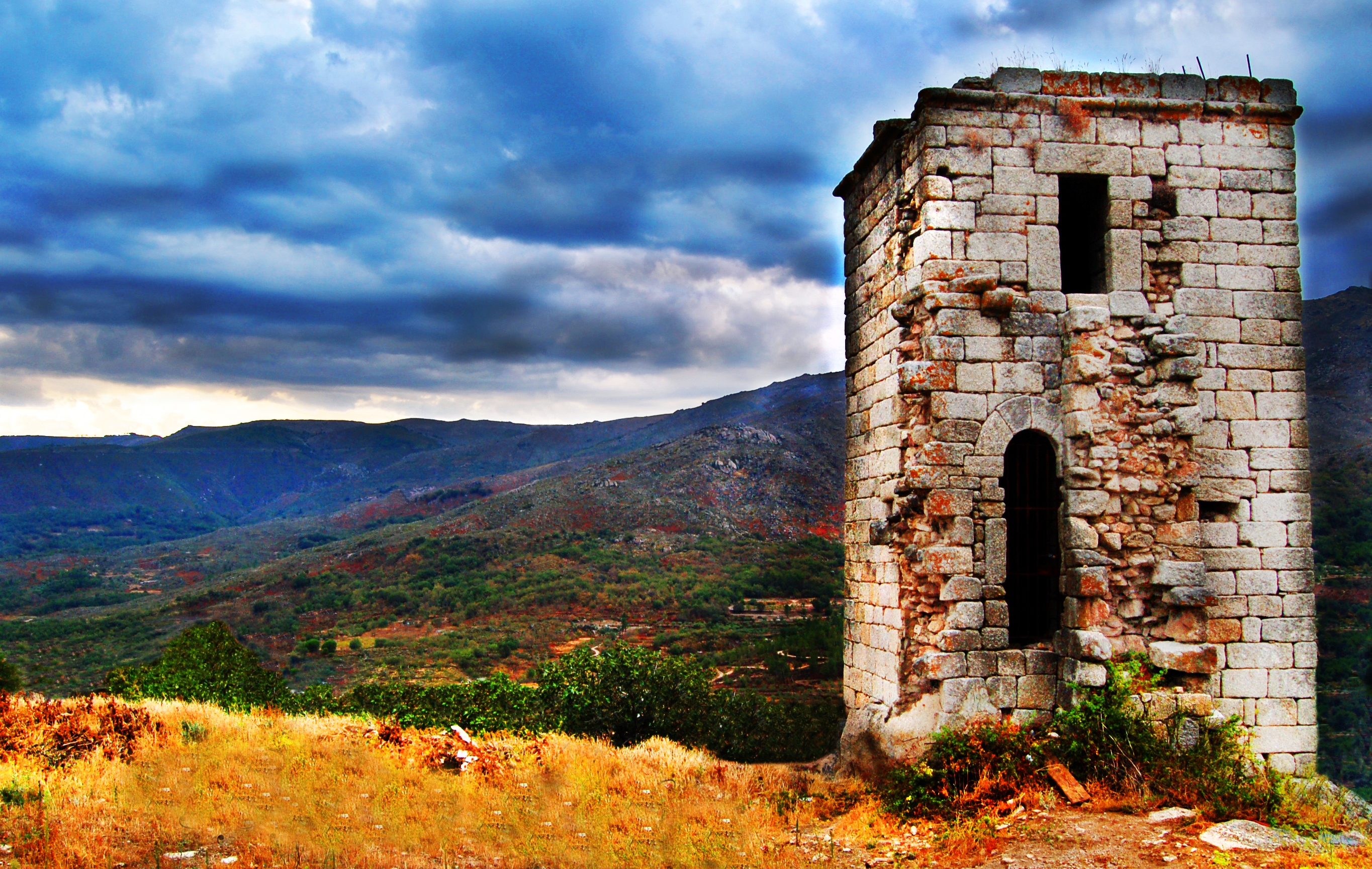 Binaca 2010